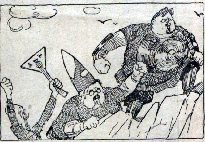 Пуришкевич, Бобринский и Савенко отправляются в поход (карикатура, 1913)